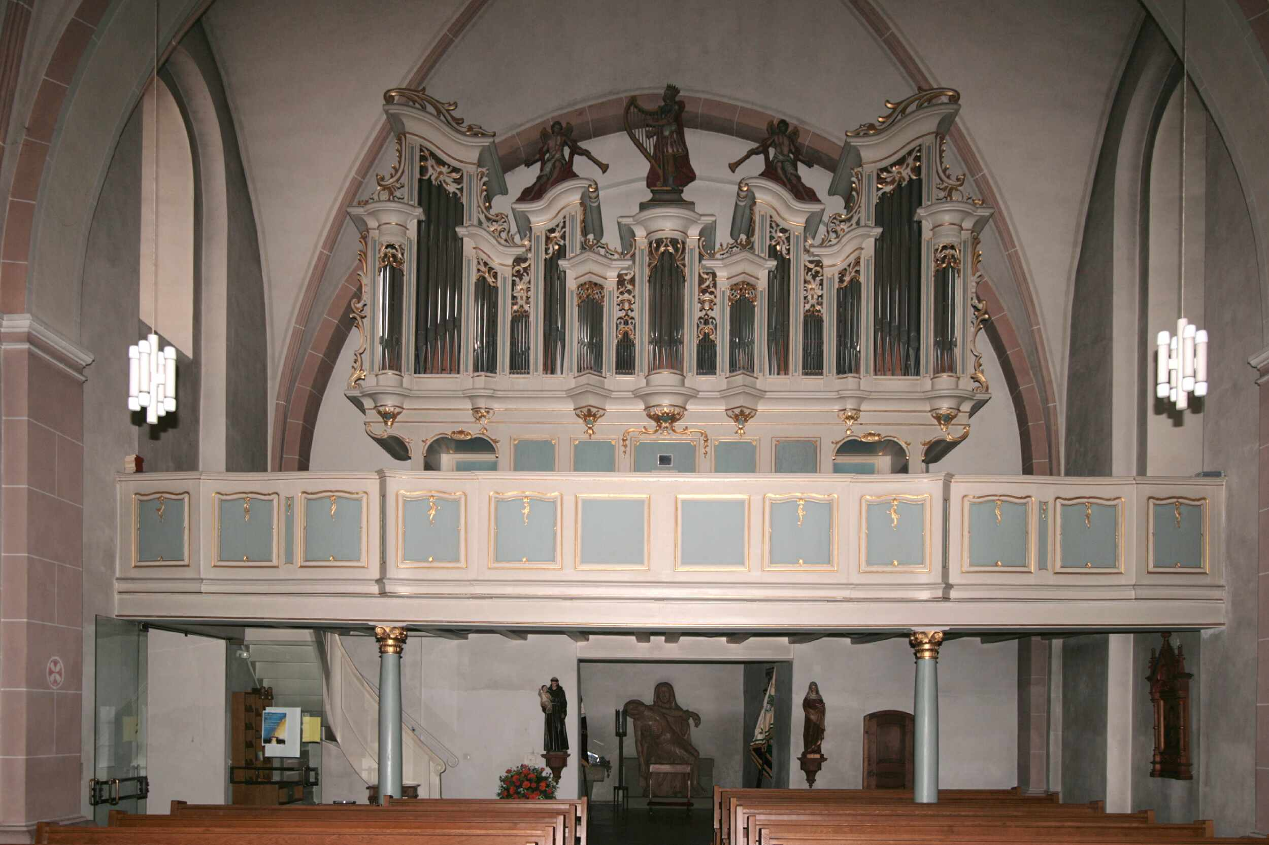 Orgel in der Kirche St. Martin in Bigge